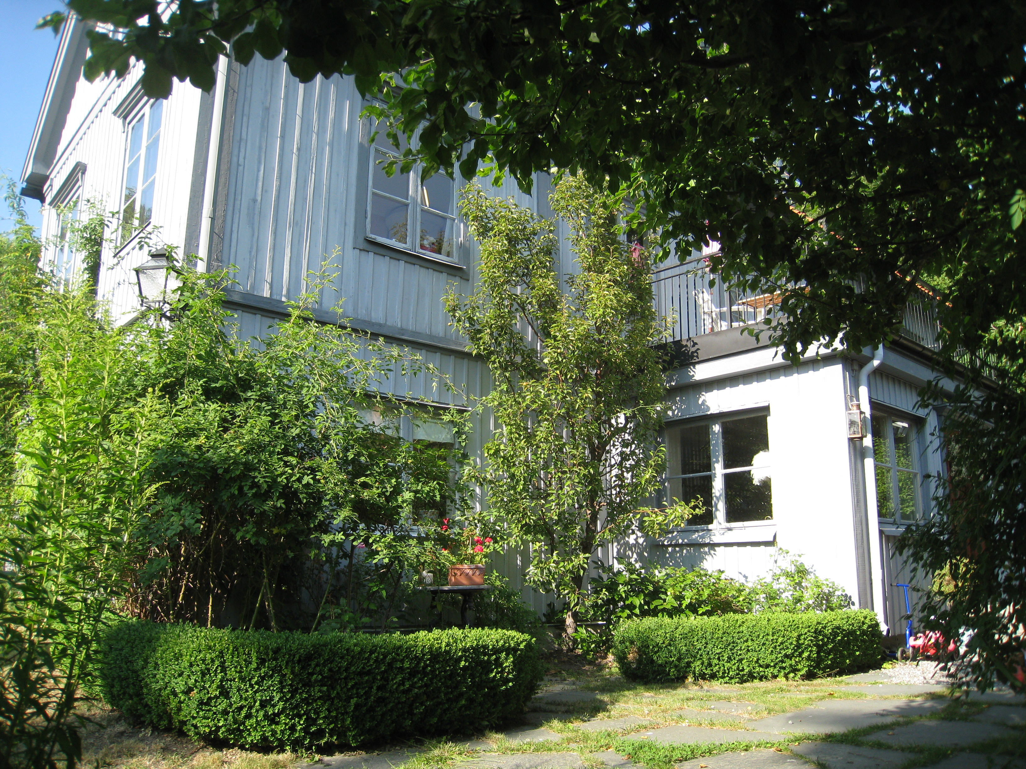 Äppelvikens gård, Äppelviksvägen 31, Bromma, väster om Stockholm. På 1750-talet tillkom de äldsta delarna av detta hus. Namnet Äppelviken kommer från detta torp, som numera är villabostad. Äppelviksvägen leder ned till viken vid Mälarstranden.